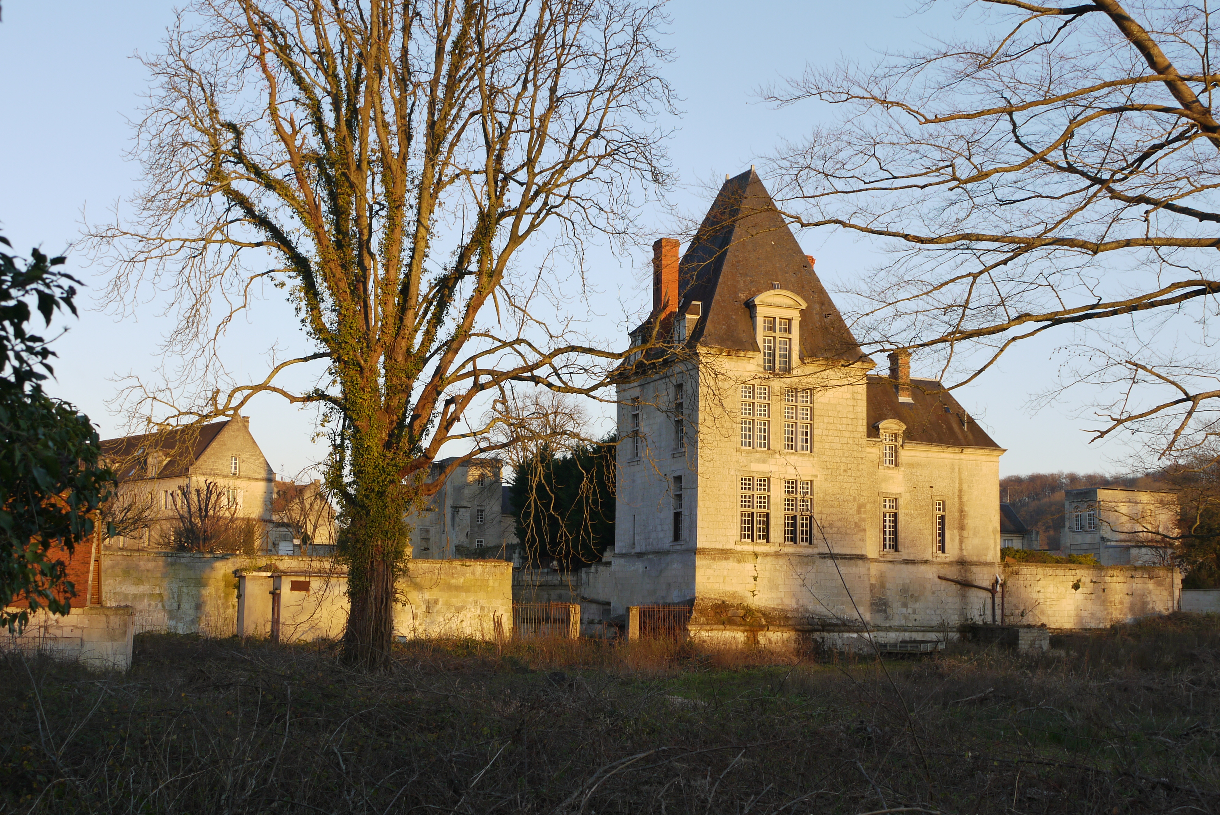 Château de Coeuvres et valsery